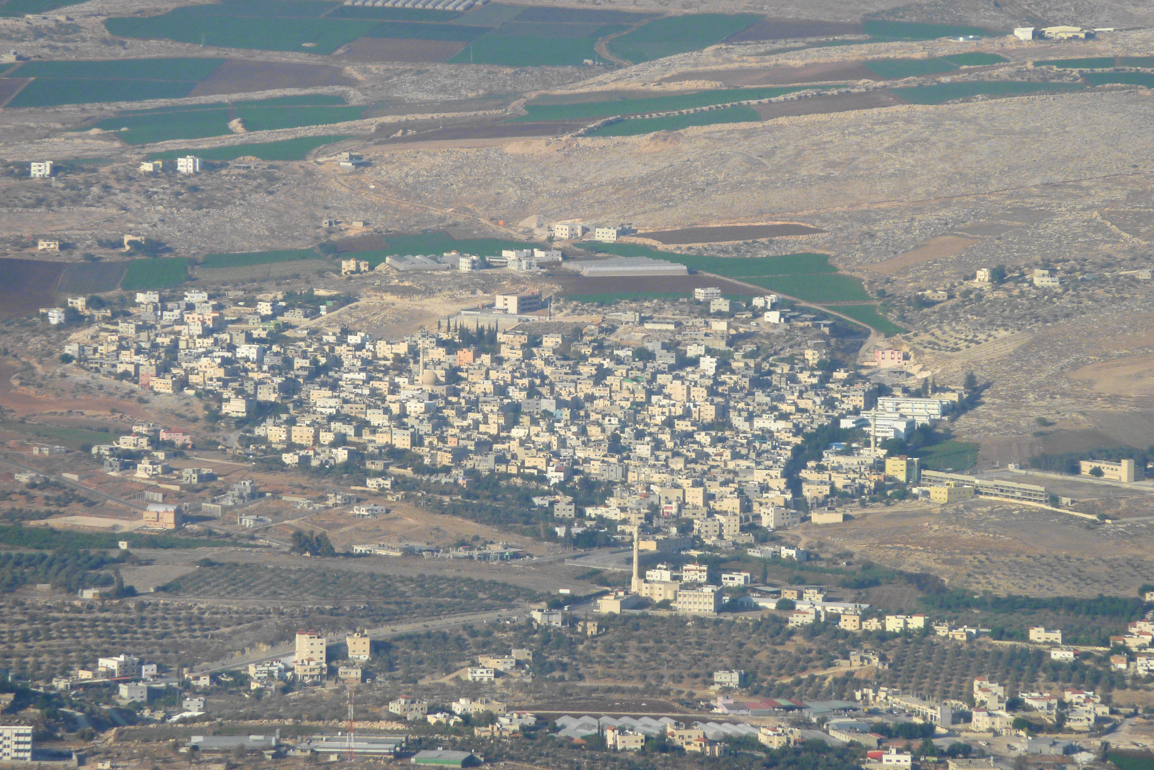 Tubas